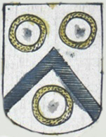 Stammwappen Maillot de la Treille, aus: Wappen Nicolas Maillot de la Treille päpstlicher Prälat und kurpfälzischer Hofkaplan